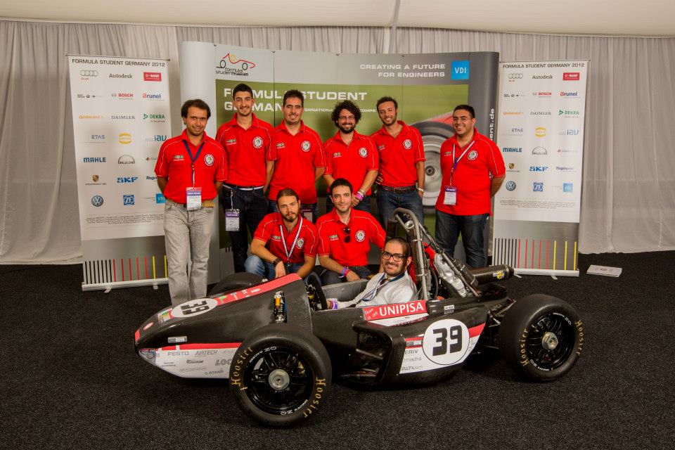 2012EteamadHockeneim